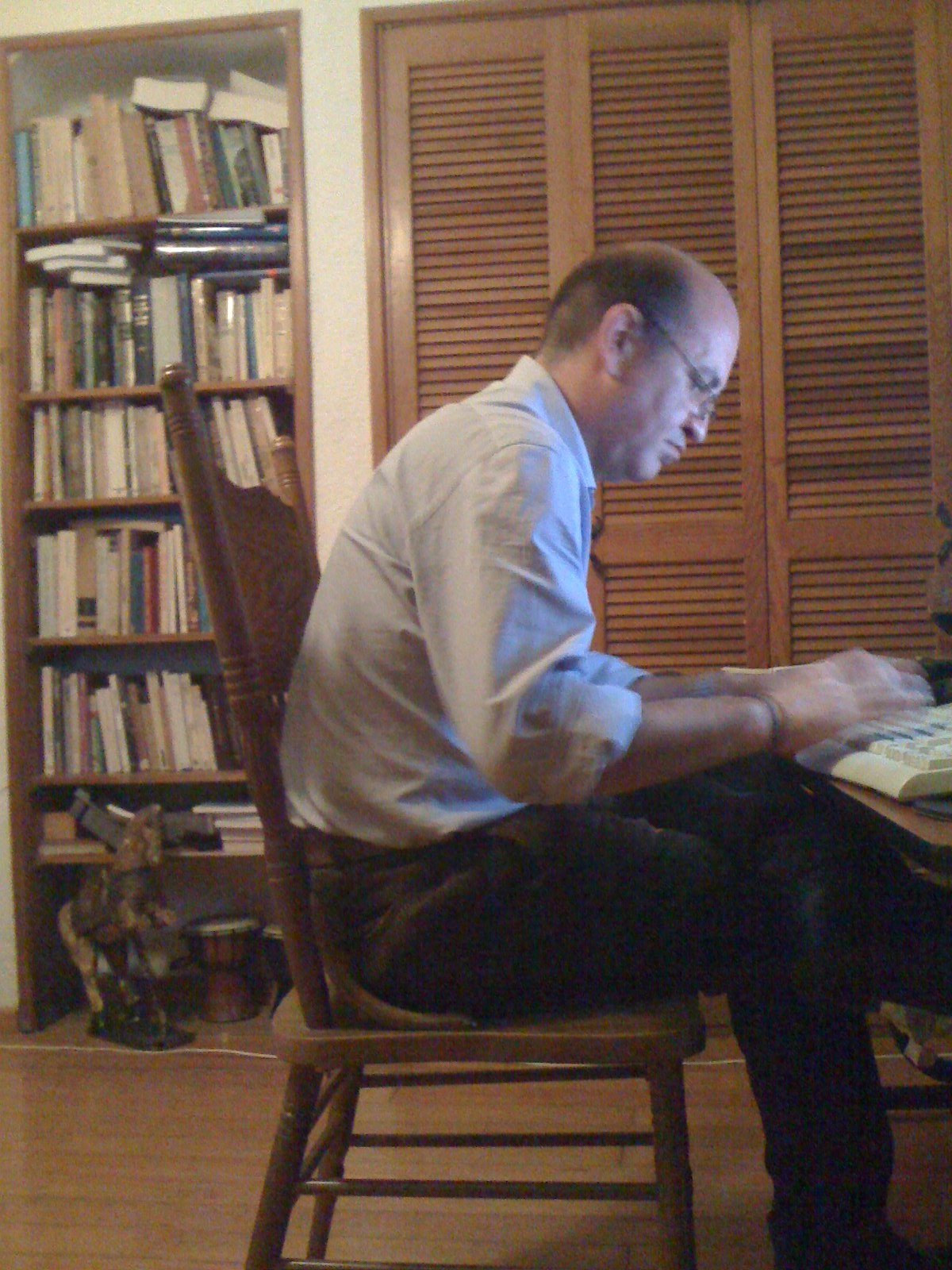 Escritor, científico, biologo, Fedro Carlos Guillén. en su estudio escribiendo. Distrito Federal.